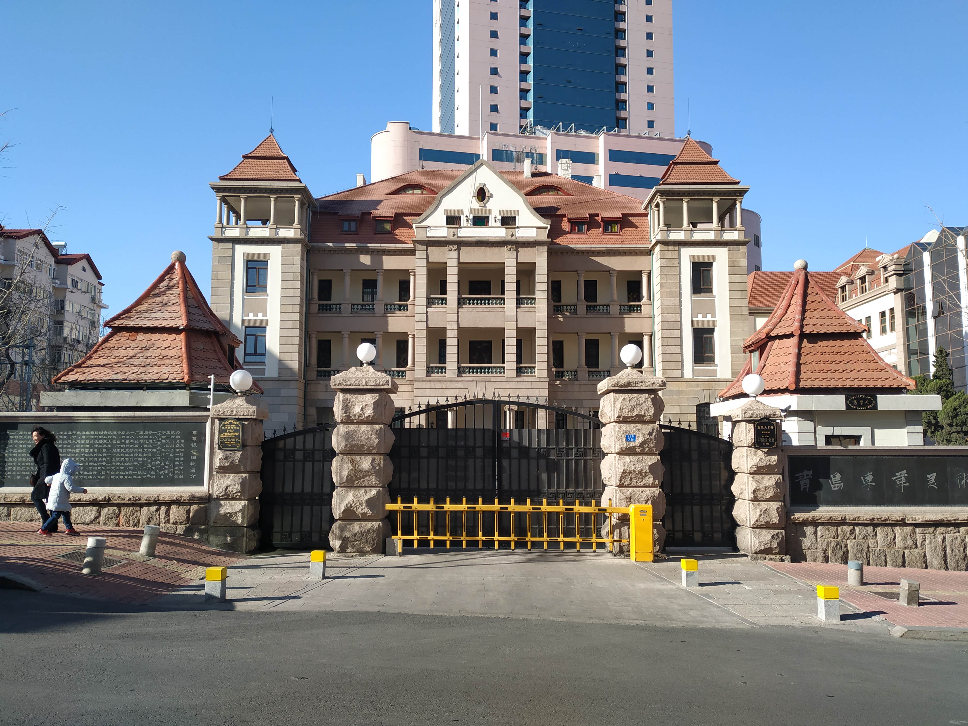 中文（中国大陆）: 青島湖南路39號